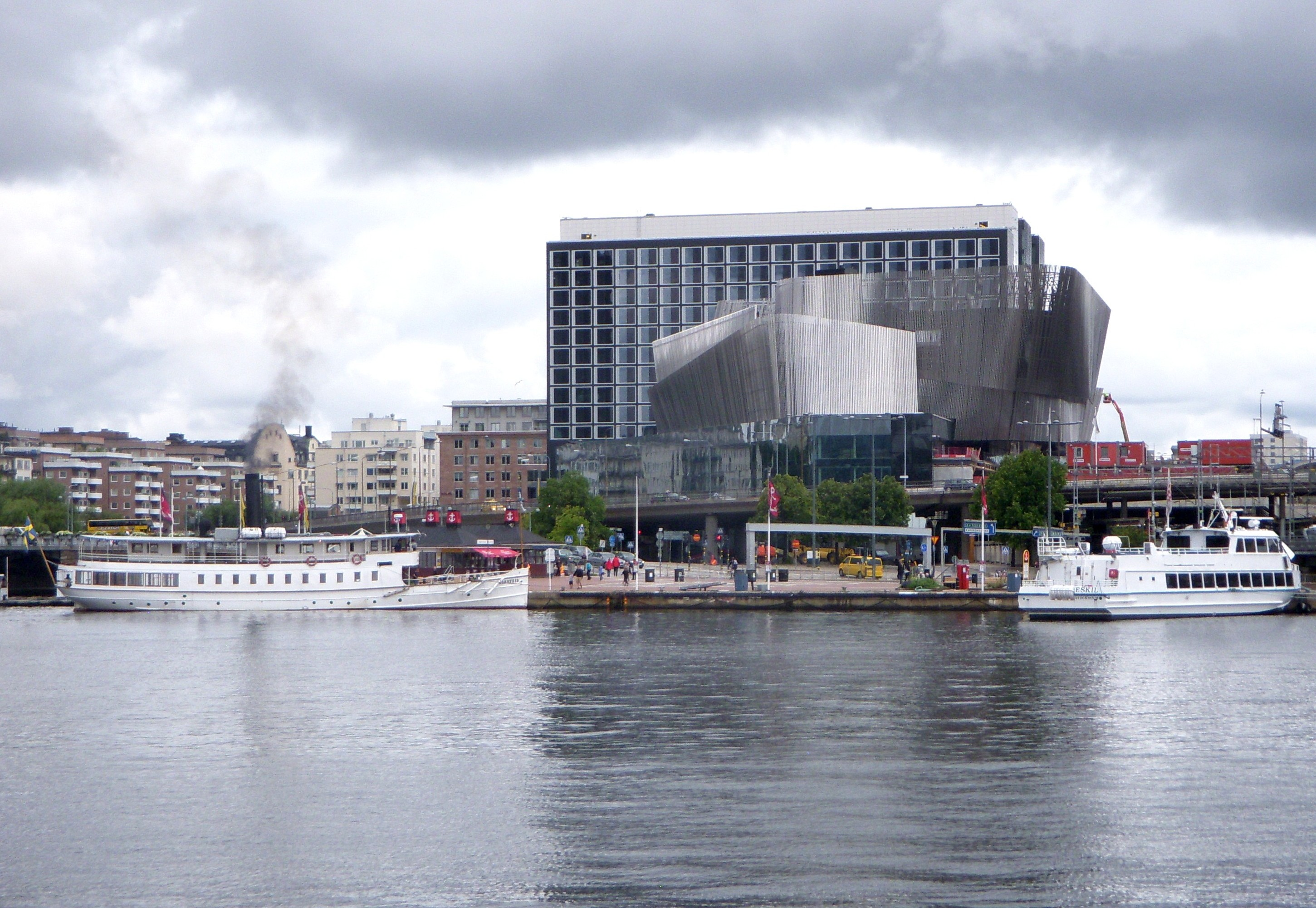 Waterfront building i Stockholm